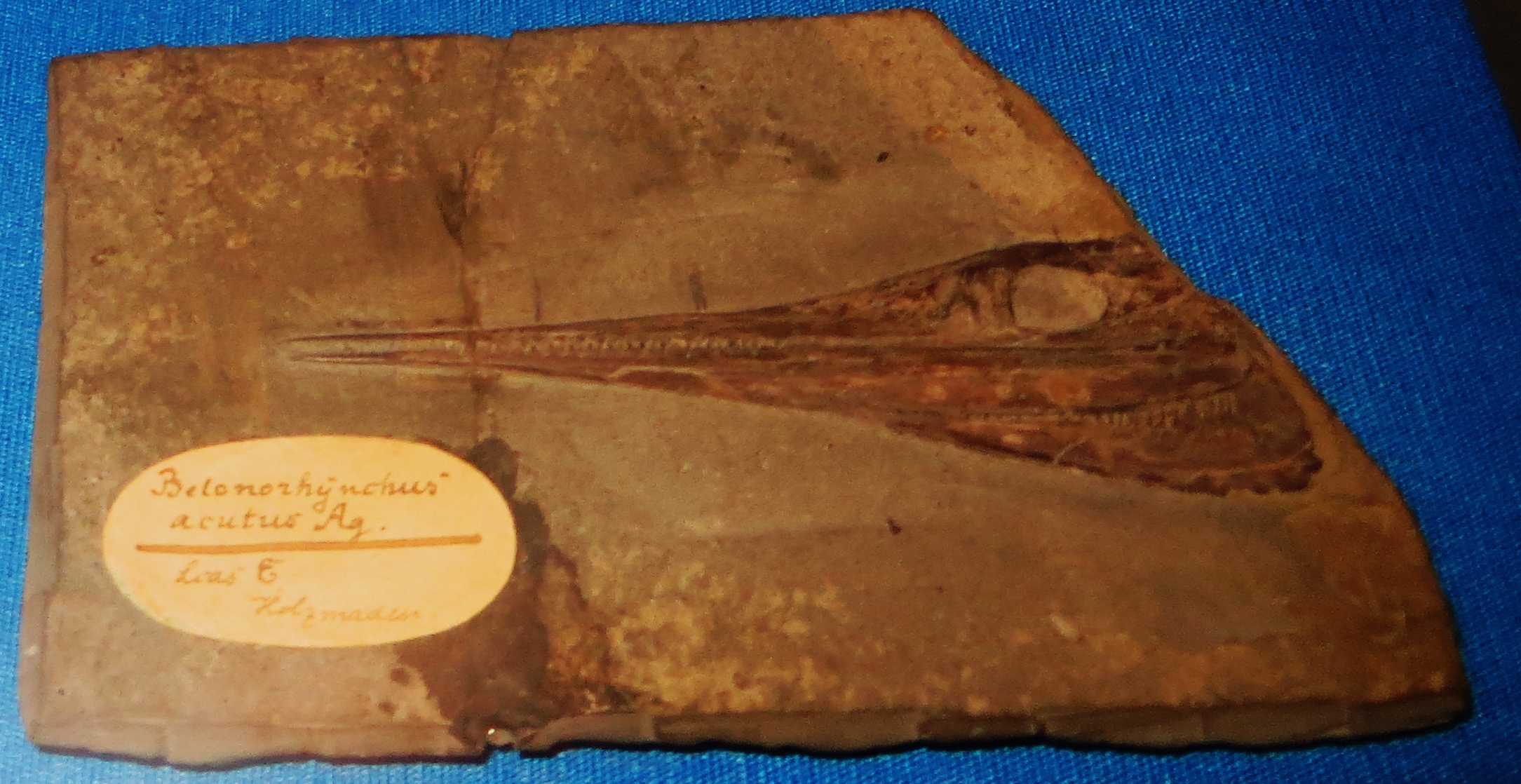 Fossil of Saurorhynchus, an extinct fish- Took the picture at Museum of Paleontology, Tubingen